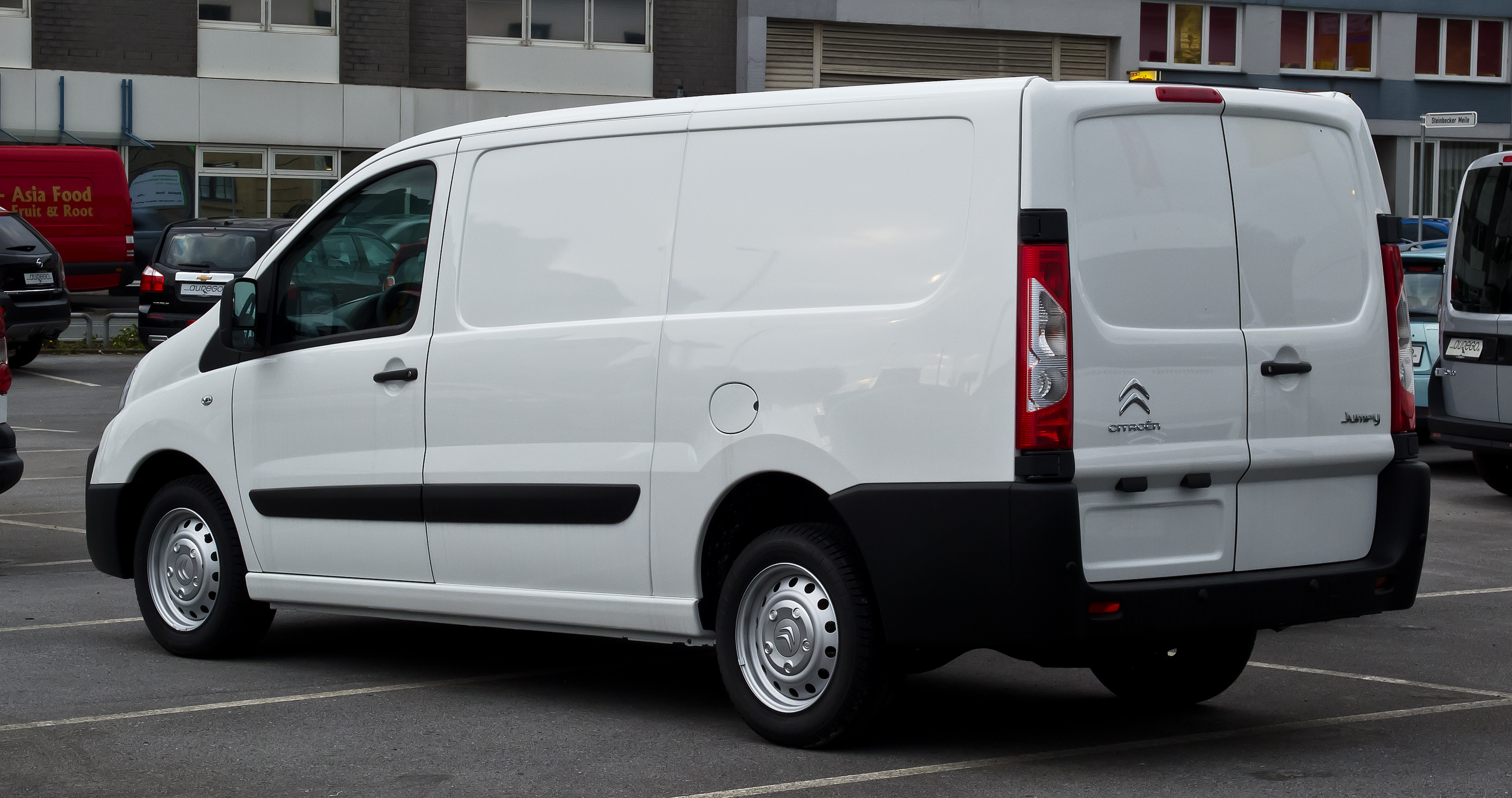 Citroën Jumpy Kastenwagen HDi 125 (II, Facelift)